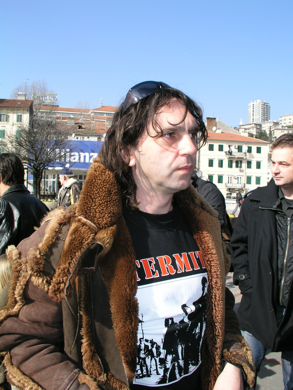 "Riječki novi val" ispred Konta u Rijeci, Mrle iz Termita i Leta 3, Hrvatska